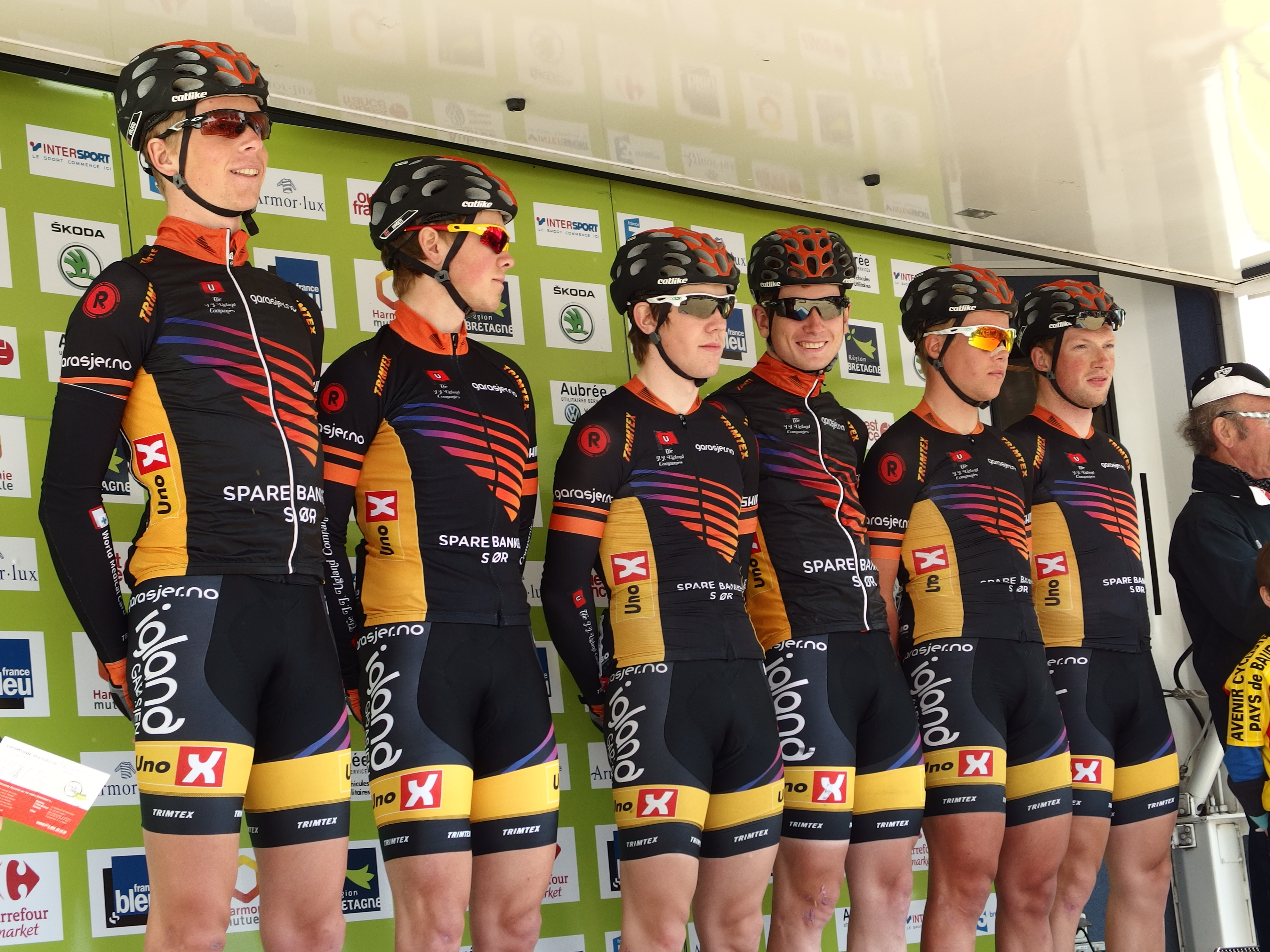 Tour de Bretagne 2015 - Présentation des équipes au départ de la troisième étape à Baud - Équipe Sparebanken Sør Depicted people: Andreas Erland, Carl Fredrik Hagen, Kristian Aasvold, Andreas Vangstad, Fridtjof Røinås and Vegard Robinson Bugge